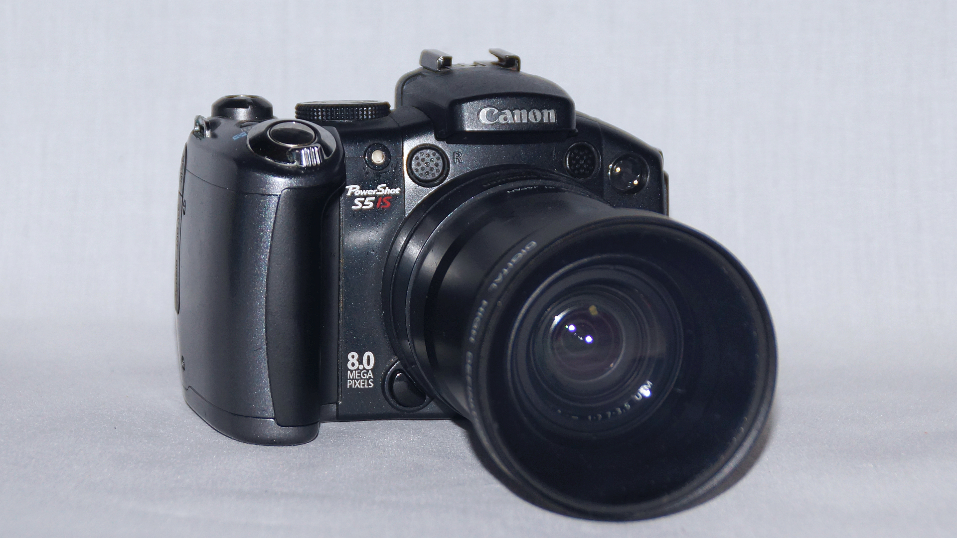 Canon S5 IS: eine Bridgecamera mit Zoom 1:2.7-3.5 36-432mm (KB) - Foto Wolfgang Pehlemann DSC04870